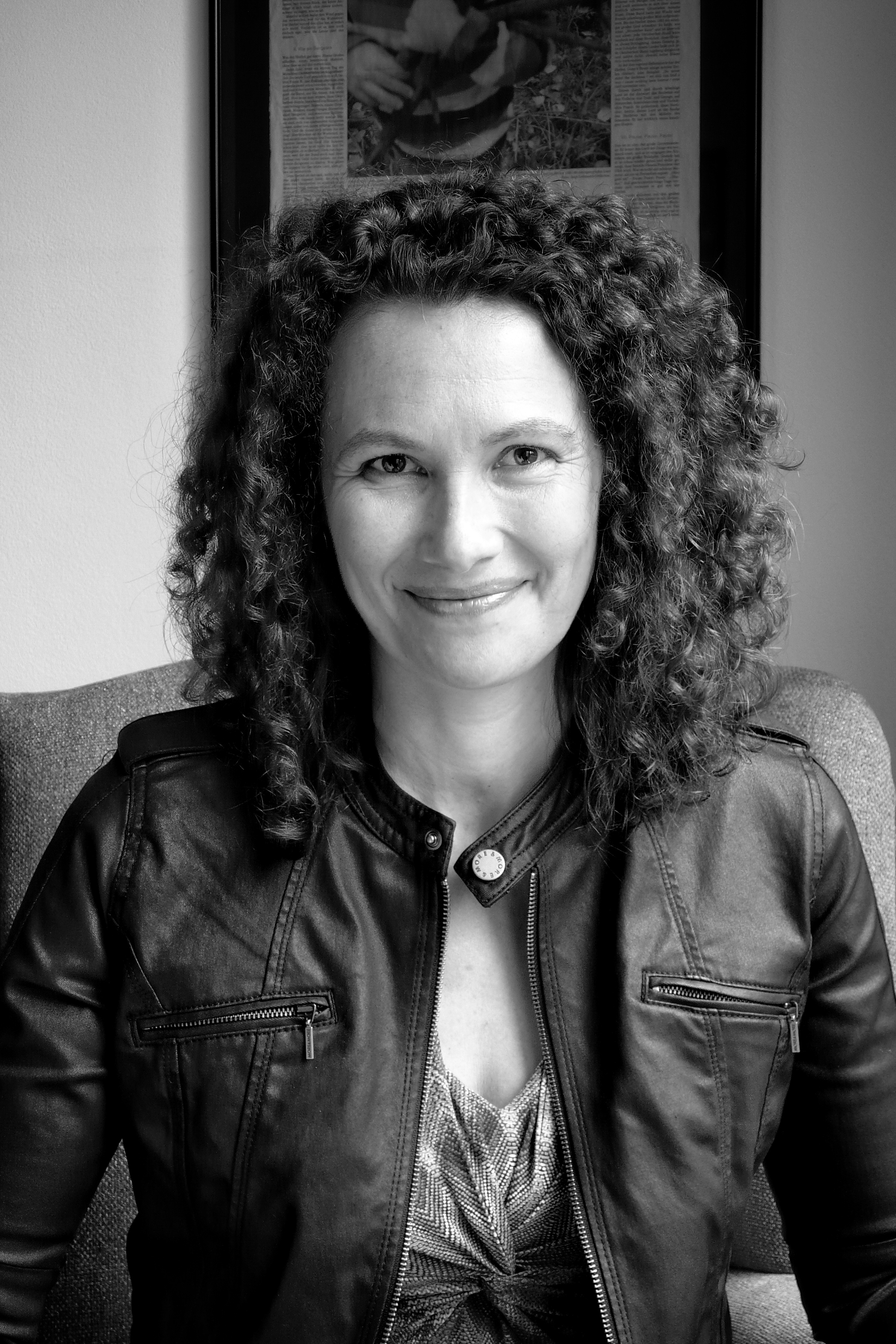 Porträtfotografie der Schriftstellerin Gerda Stauner